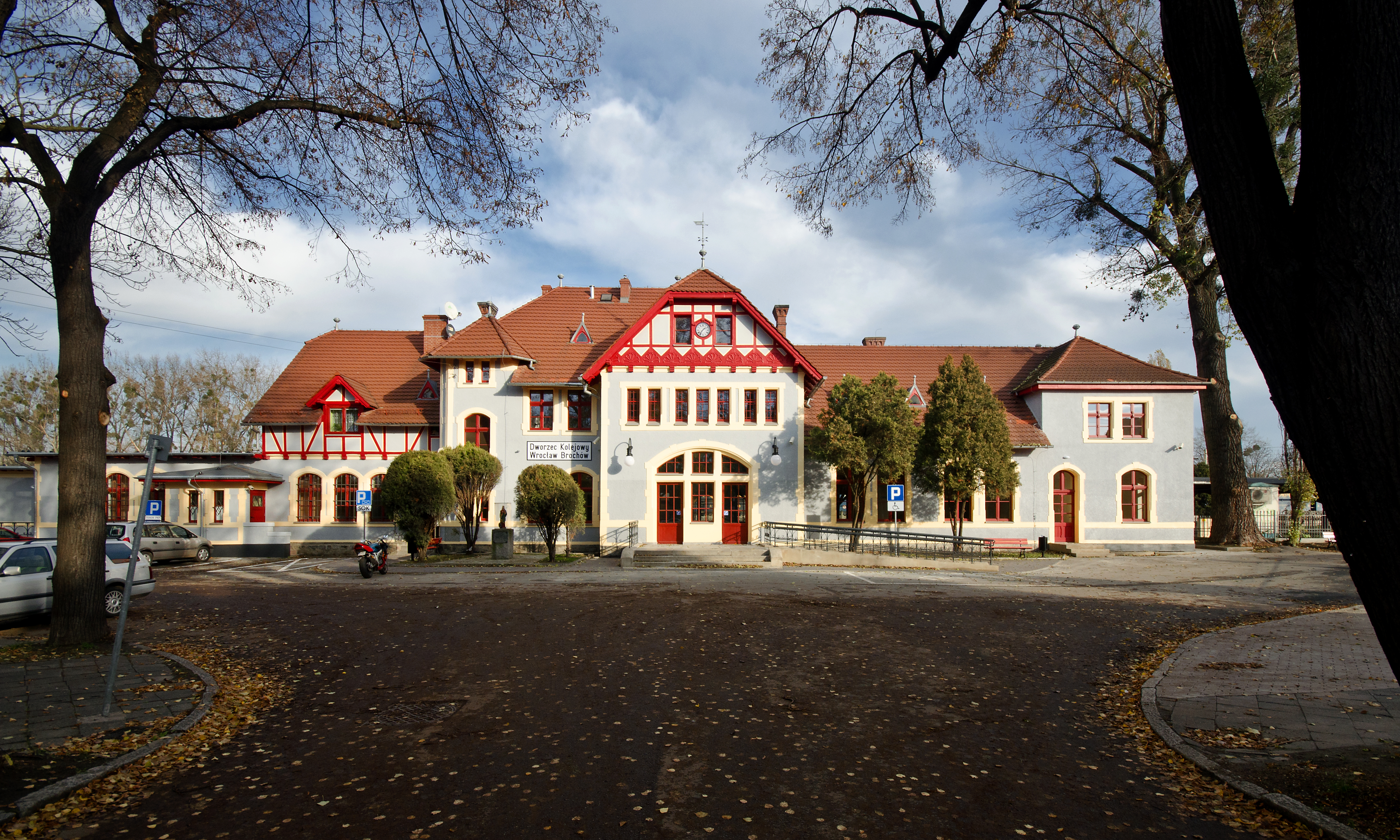 Wrocław Krzyki, Mościckiego 36 - Dworzec PKP Wrocław – Brochów z 2 wiatami peronowymi (zabytek A/2633/430/Wm)